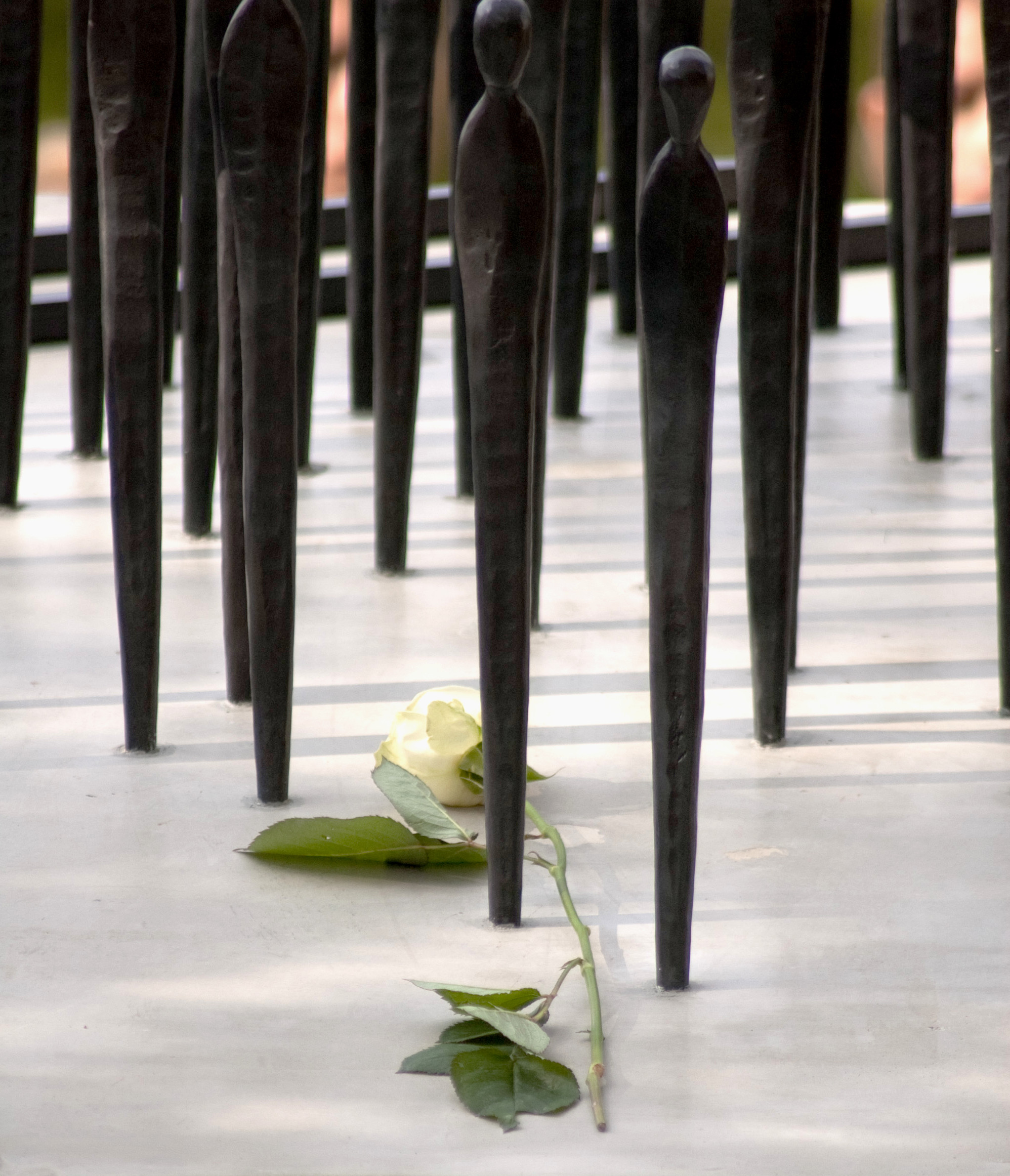 2010 errichtetes Mahnmal der Gemeinde Poing zum Gedenken an die Opfer des Evakuierungstransportes von April 1945.